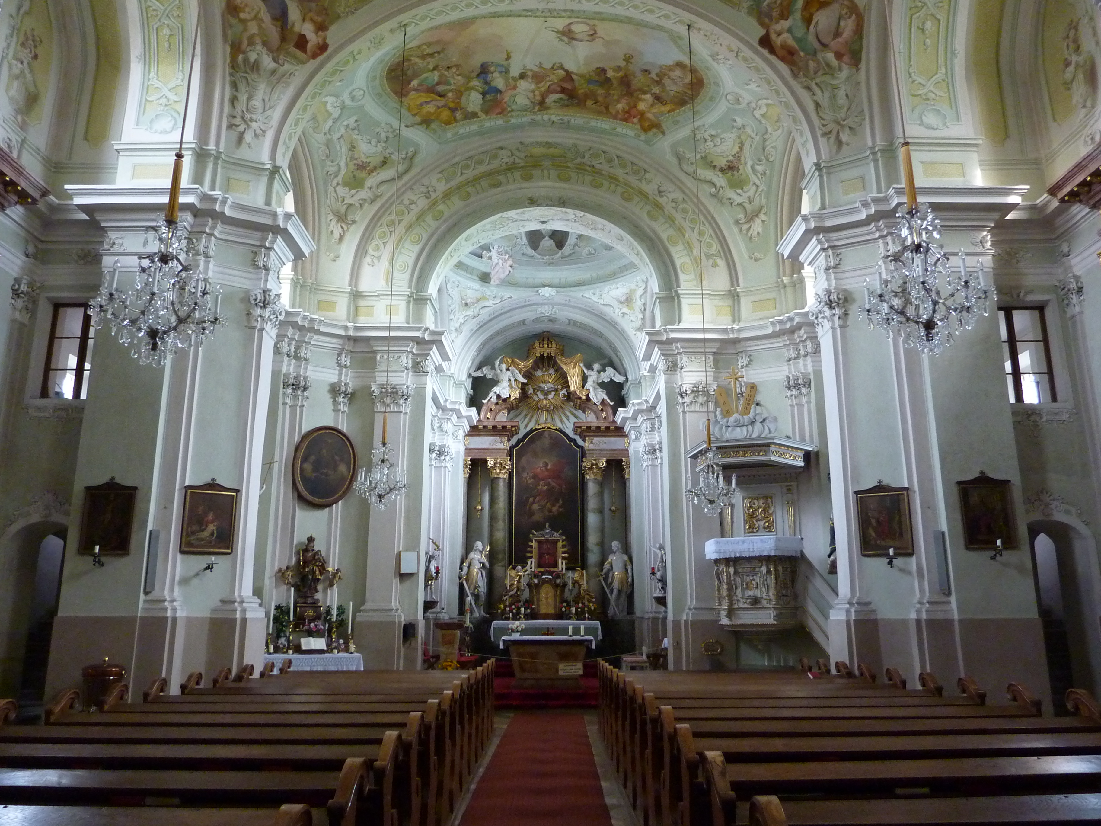 Kath. Pfarrkirche hl. Donatus/Kleinsonntagsberg und ehem. Hausberganlage, Ybbs an der Donau, Niederösterreich